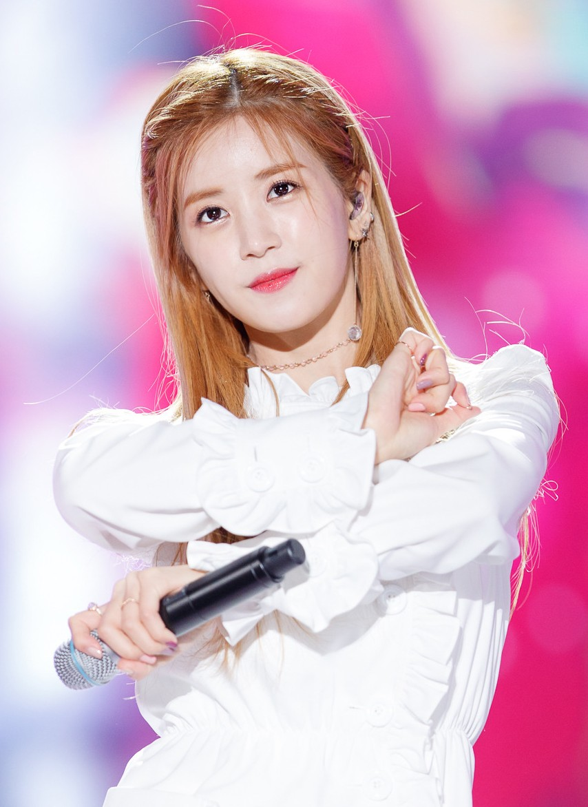 161023 부산 원아시아페스티벌 - 에이핑크